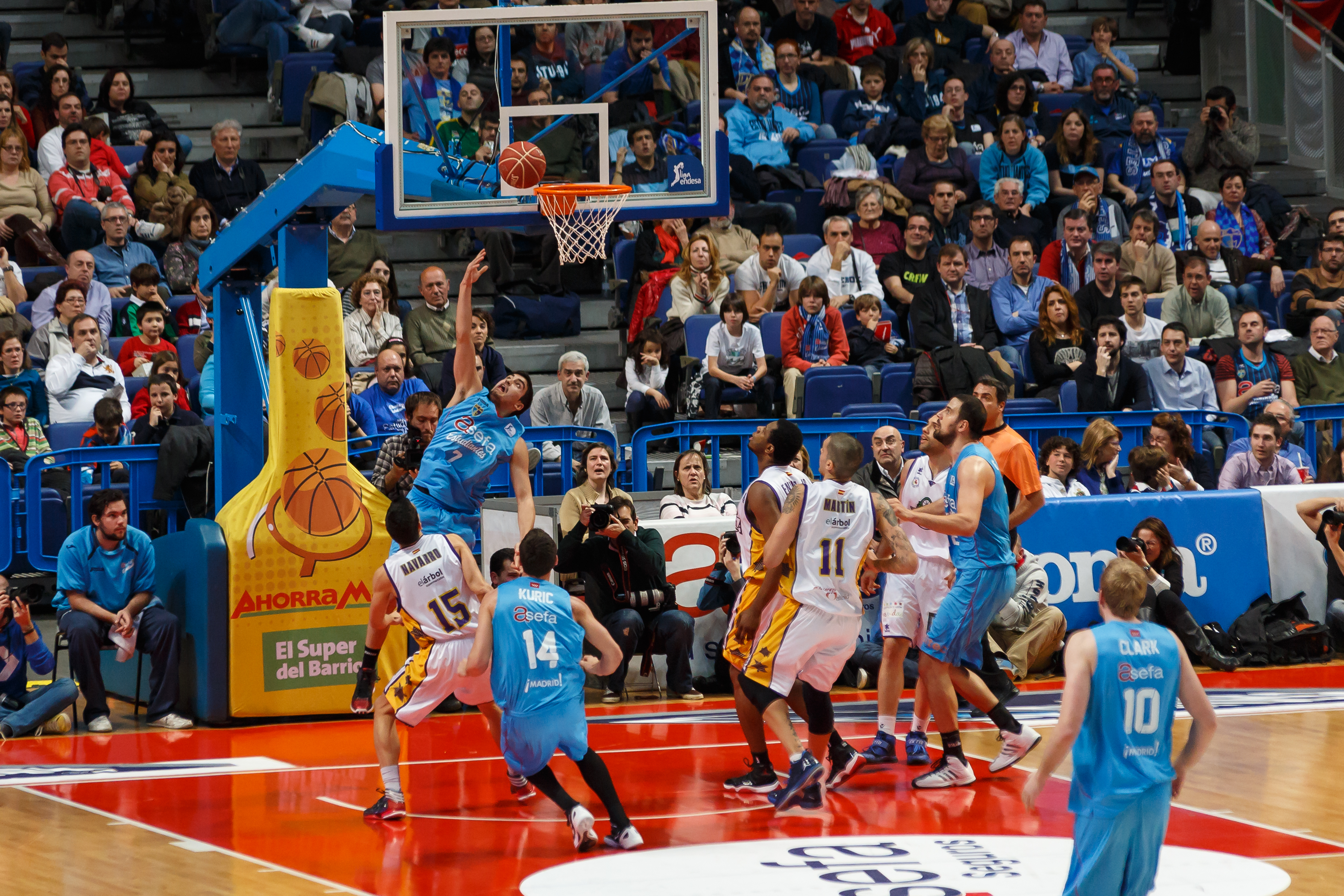 Partido de la Liga ACB entre Estudiantes y Blancos de Rueda Valladolid, Palacio de los Deportes, Madrid. Jaime Fernández tirando a canasta.